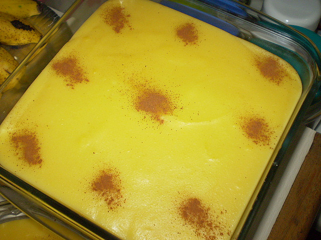 Comida Típica - Curau